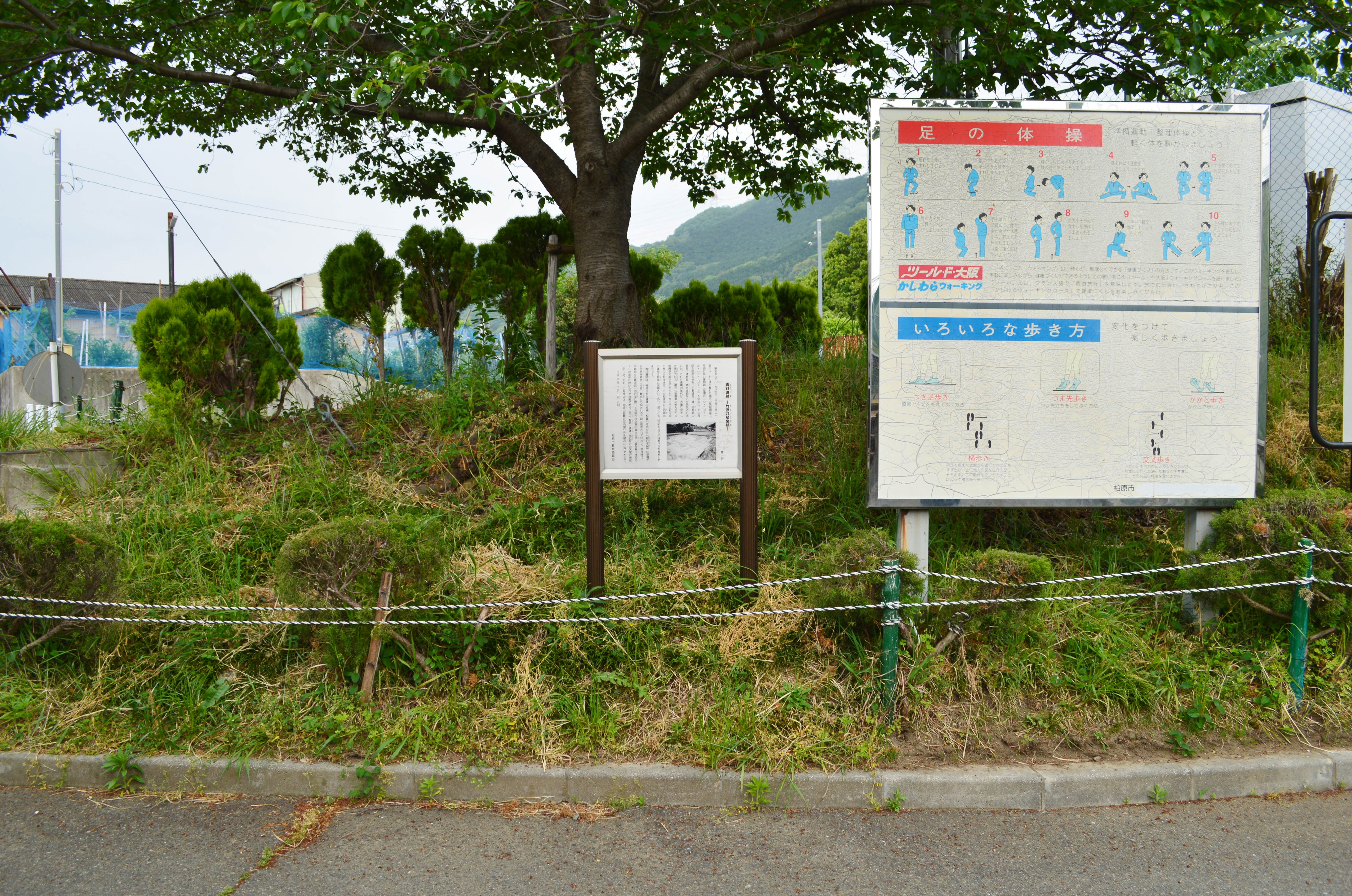 青谷遺跡 (柏原市) 説明板付近